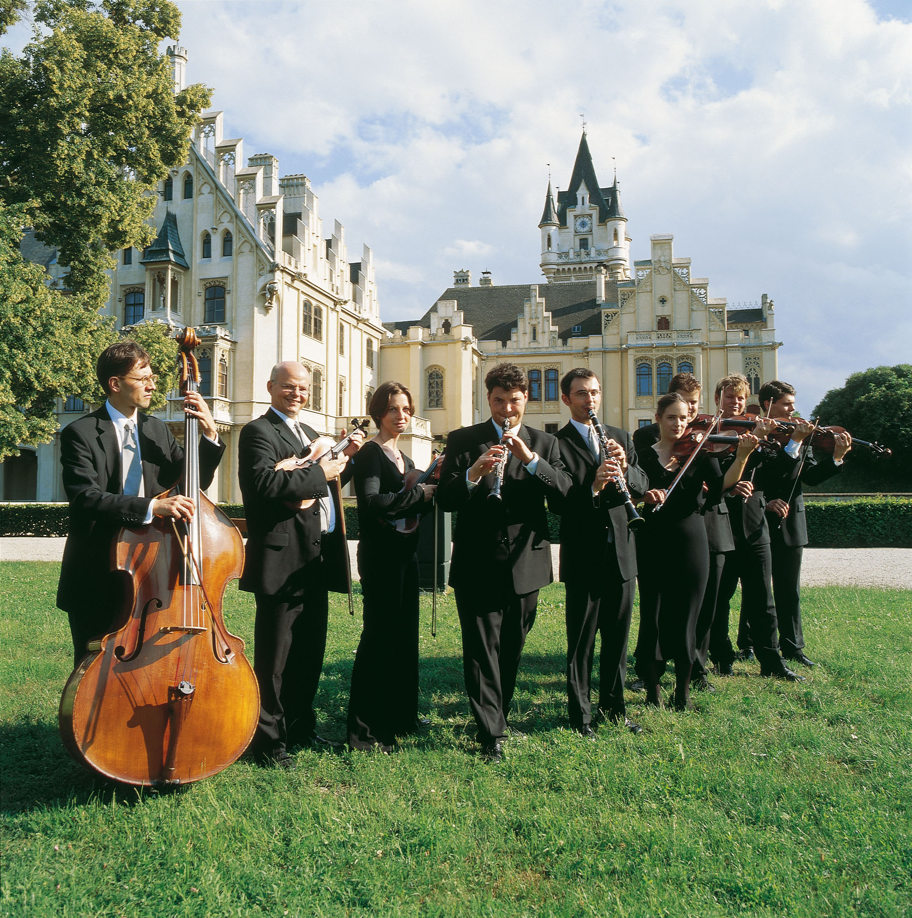 Musiker des Tonkünstler-Orchesters in Grafenegg